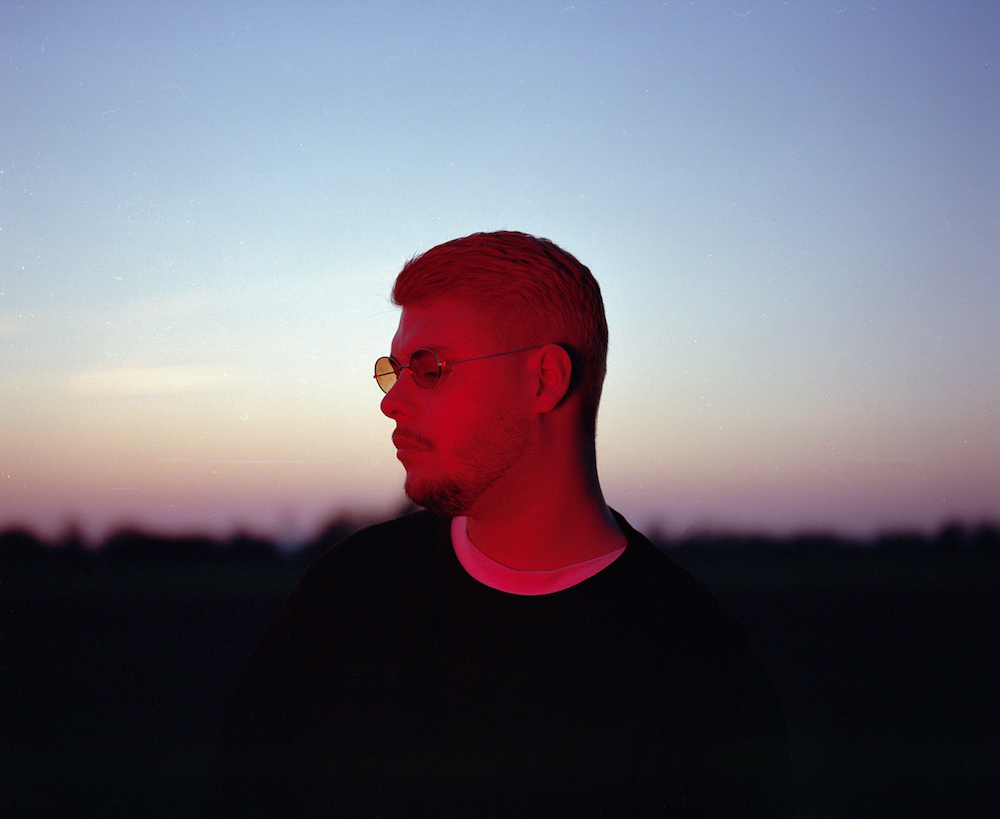 NUGAT